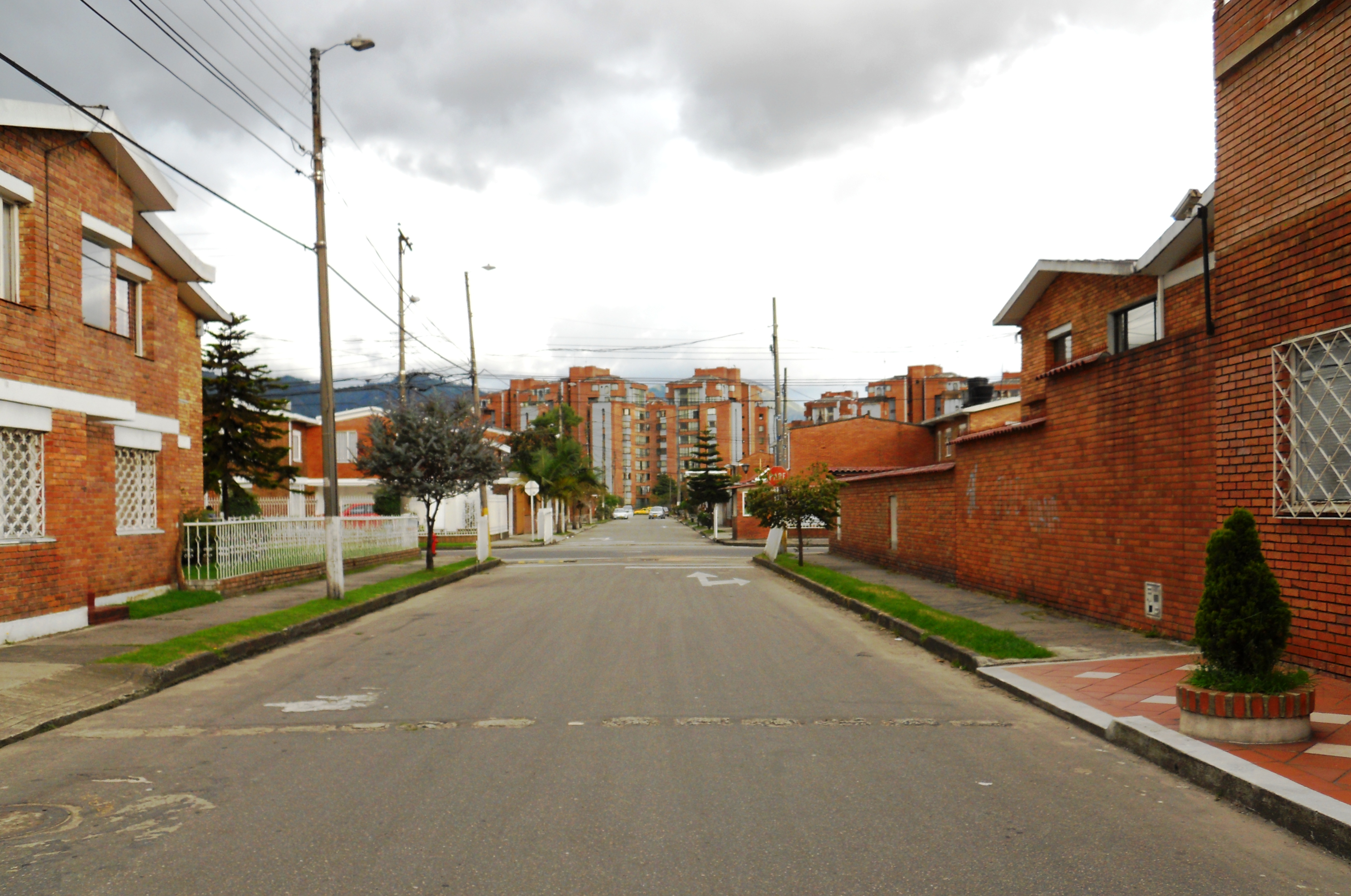 Barrio La Esmeralda en Teusaquillo - Bogotá kr 54 cl 44a.